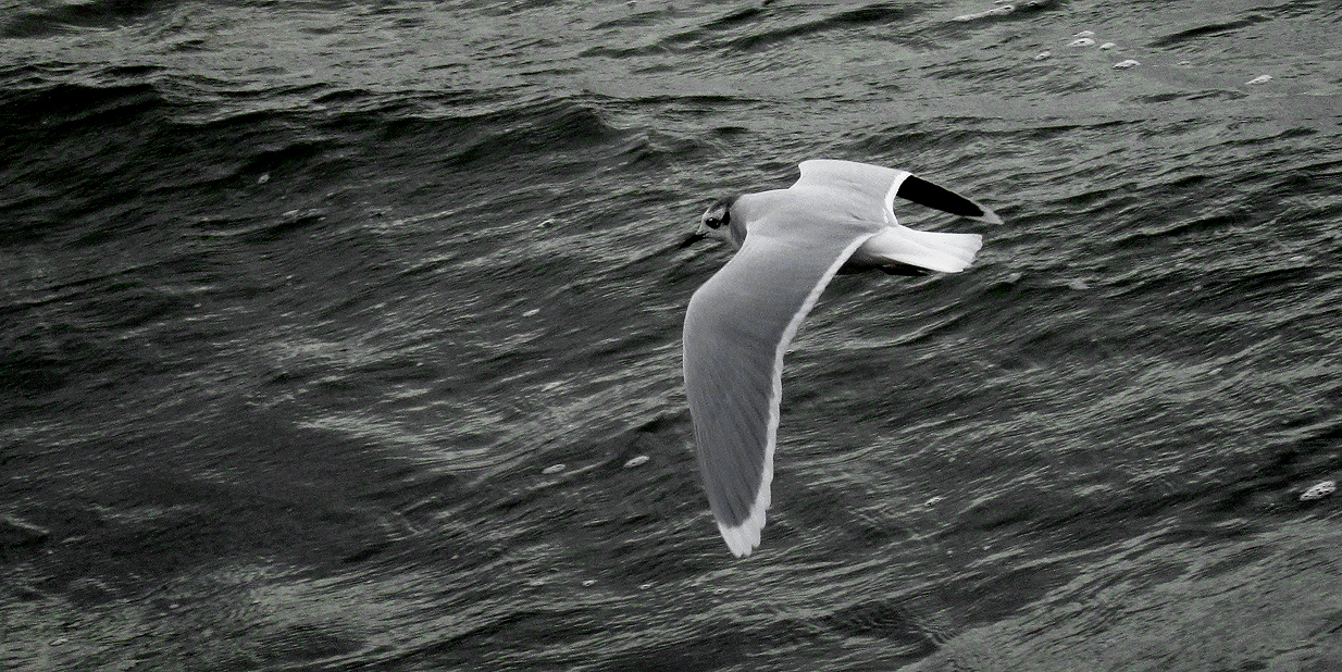 Dvärgmås Larus minutus - Adult i vinterdräkt. Världens ände Ystad 14 nov 2013.